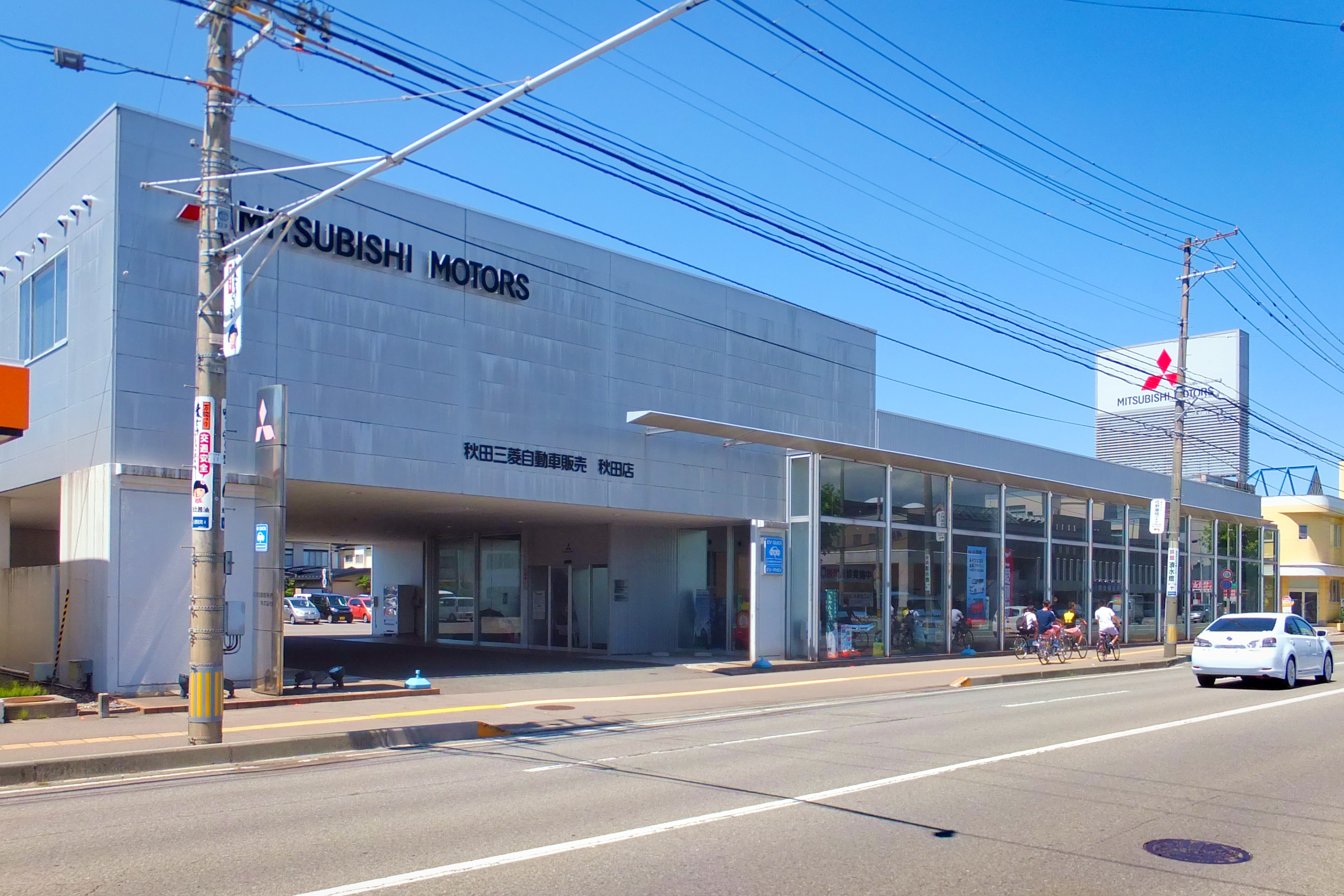 秋田三菱自動車販売（秋田市川元開和町）